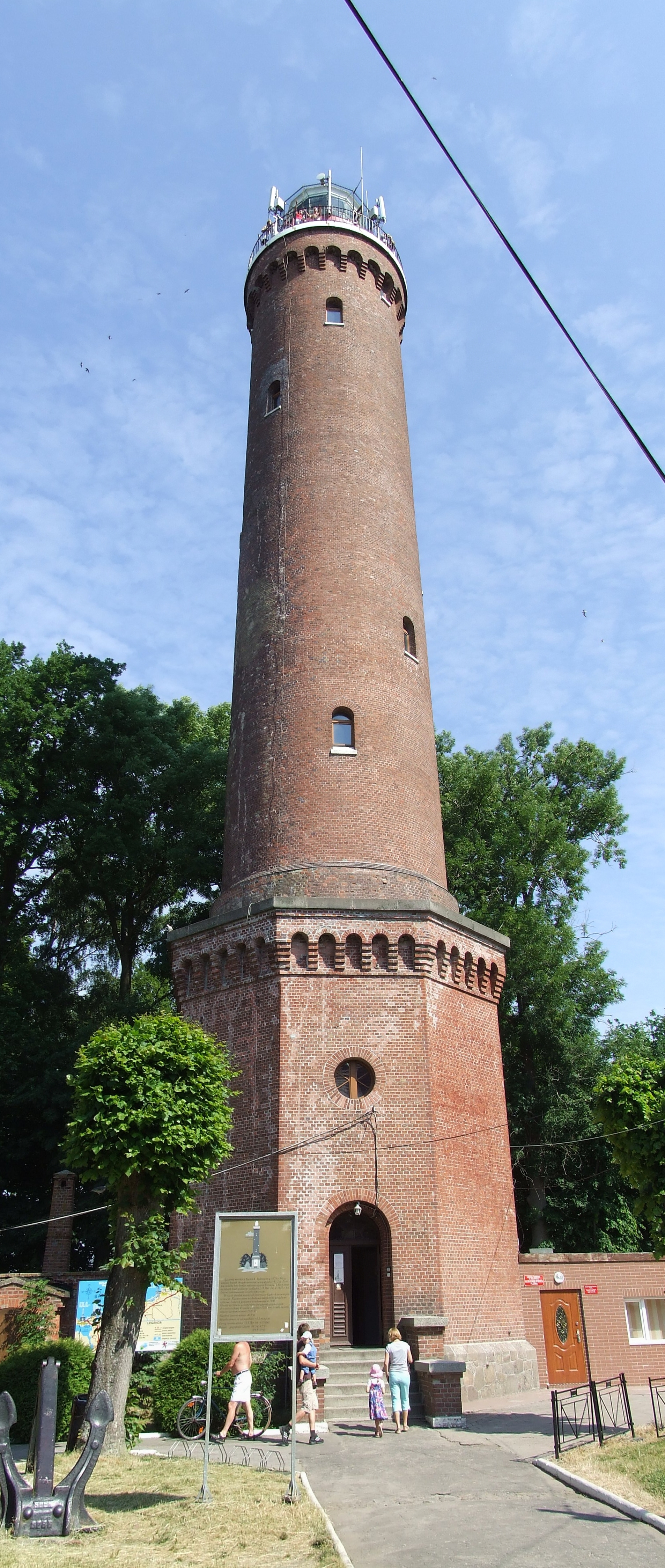 Latarnia morska w Gąskach.